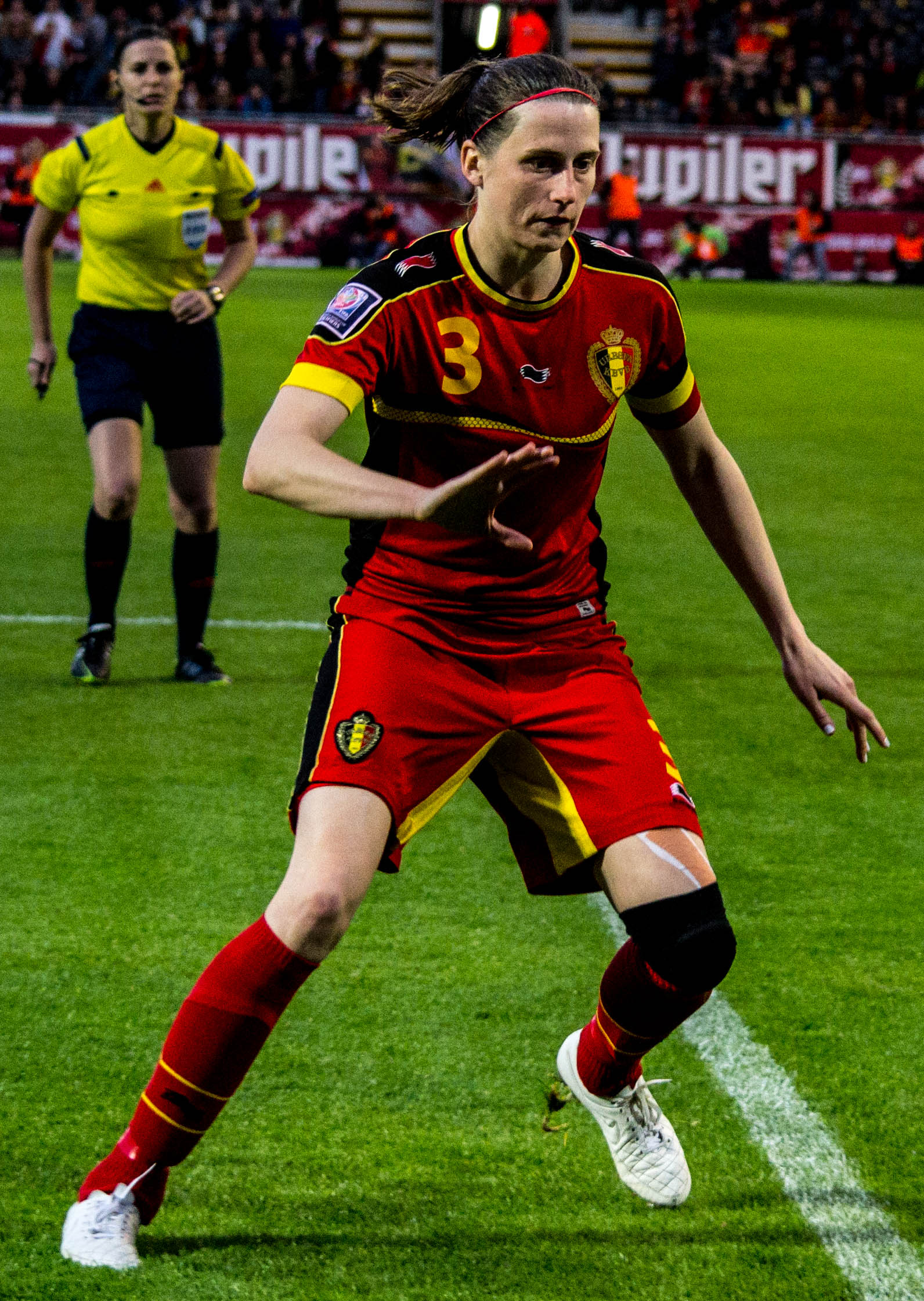 StampMedia